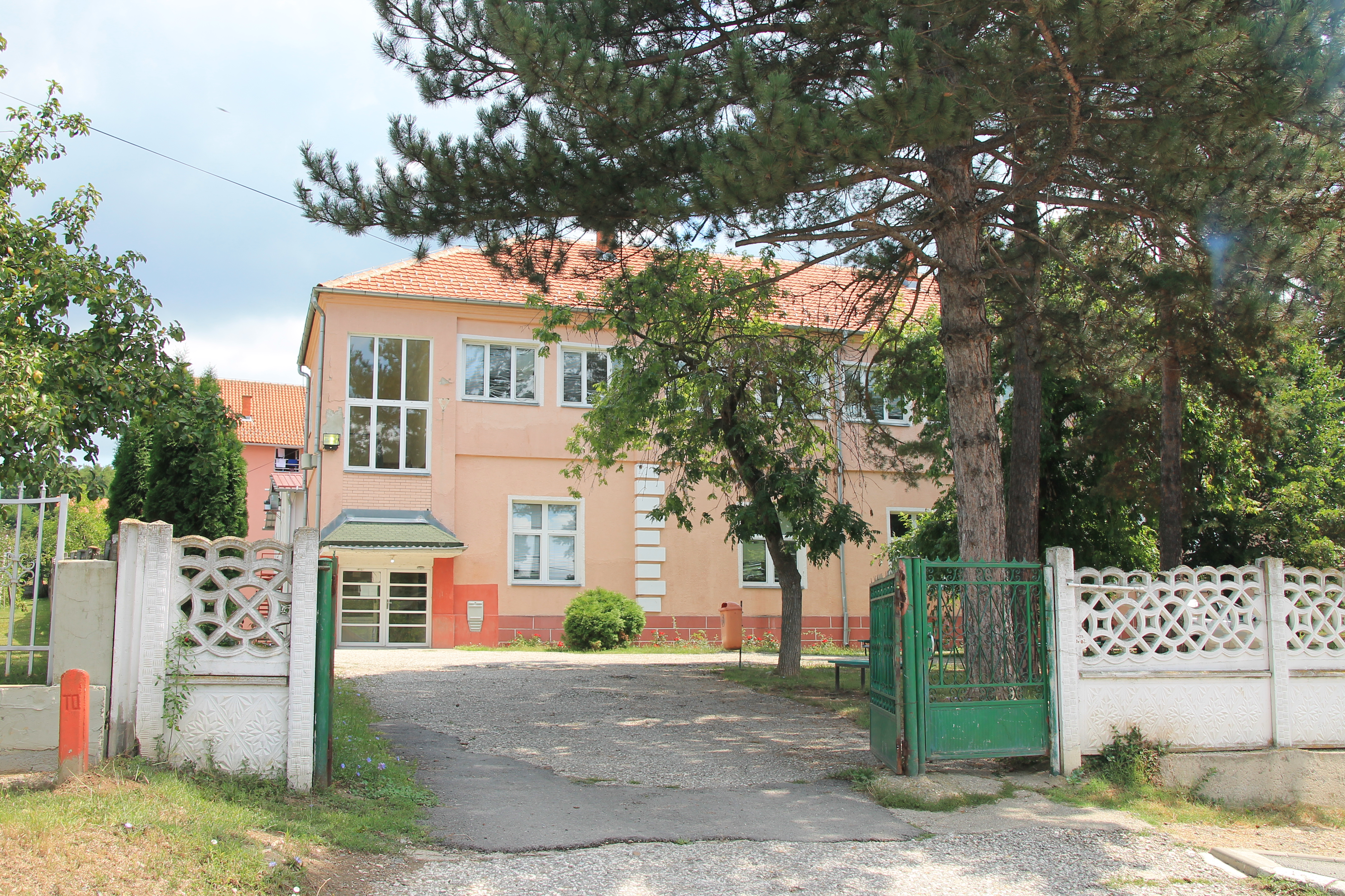 Škola u Rekovcu